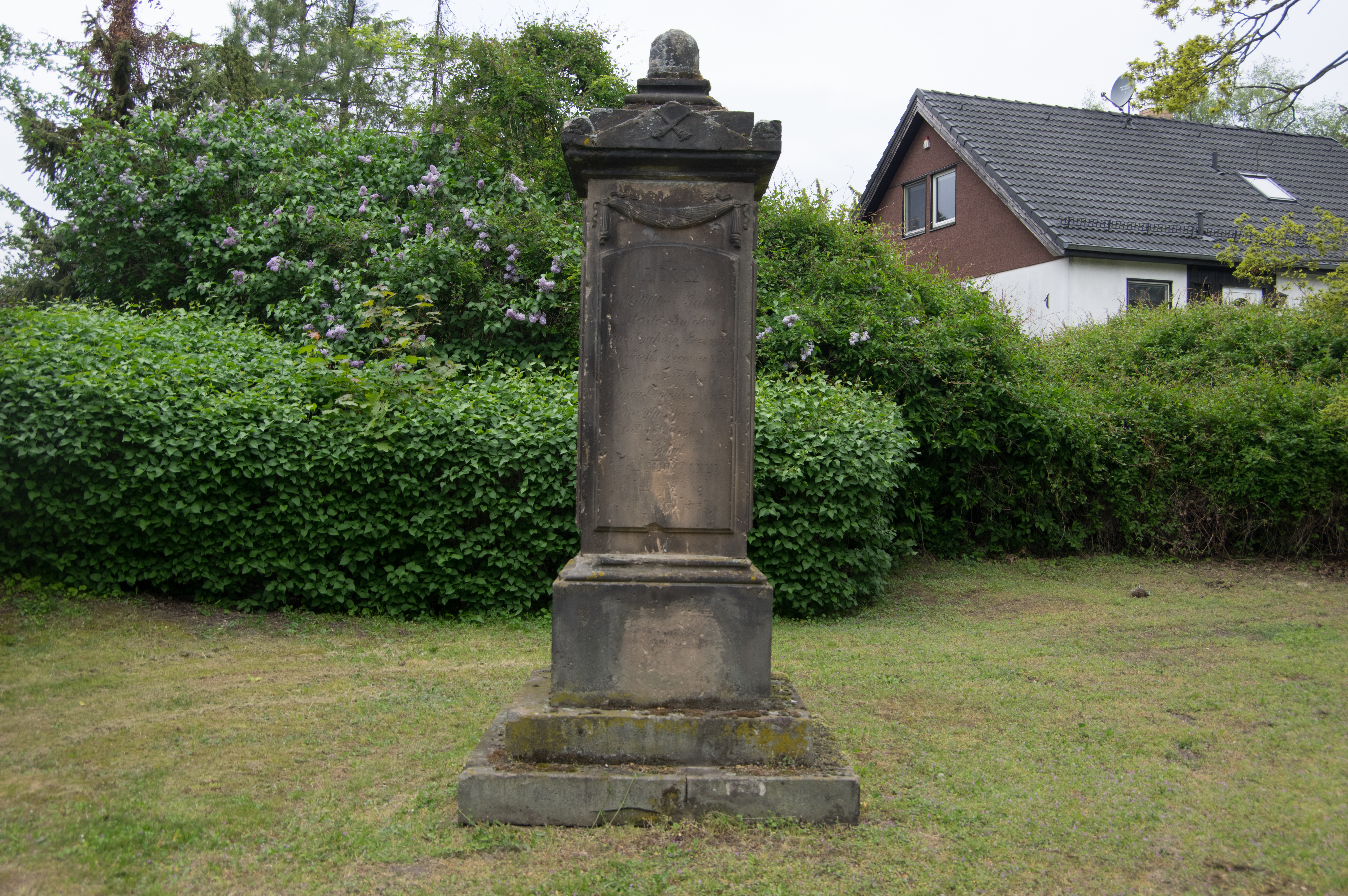 Jüterbog in Brandenburg. Der Friedhof wurde nach 1870/1871 angelegt. Er lagen gestorbene französische Kriegsgefangene, die gestorben waren.Der Friedhof steht unter Denkmalschutz.